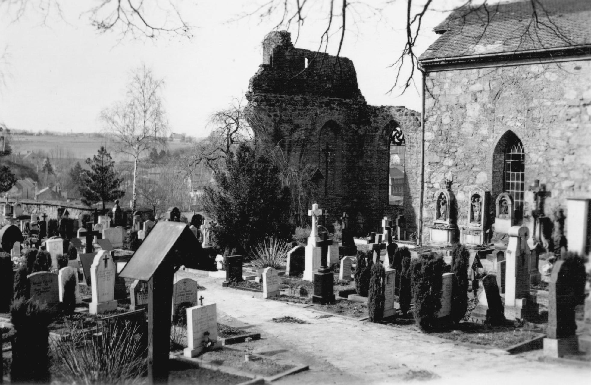 Hornjoserbsce: Mikławšk w Budyšinje wokoło 1954